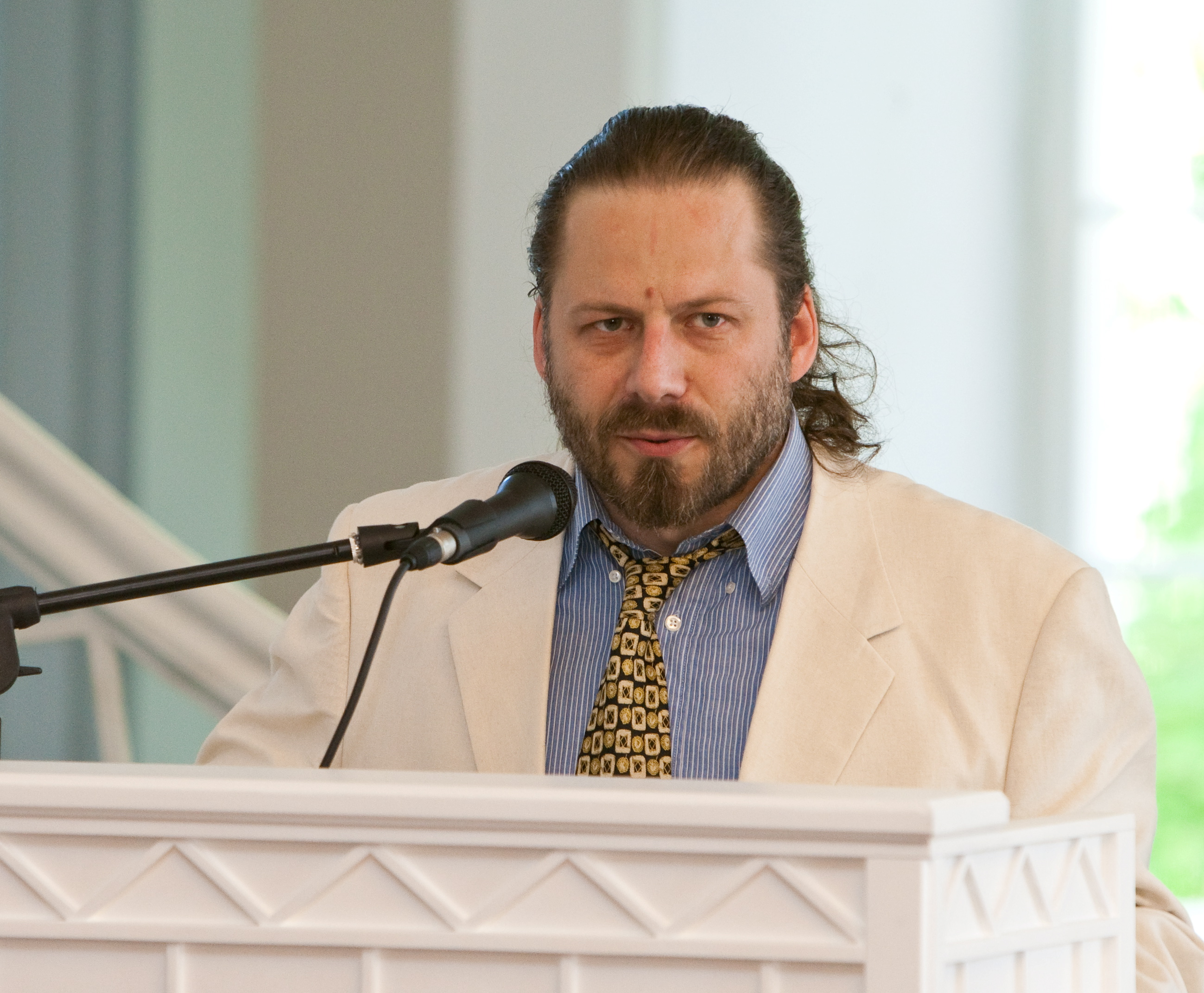 Tartu Ülikooli kultuuriteaduste ja kunstide instituudi bakalaureuseõppe lõpuaktus TÜ ajaloo muuseumi valges saalis 30. juunil 2010. KU juhataja professor Art Leete.